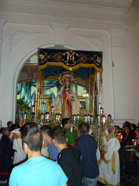 Primera vez en la historia que nuestra Señora sale en la noche con luces como un símbolo de esperanza para el mundo.